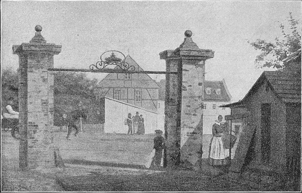 Indgangen til Blaagaard første halvdel af 1800-tallet.